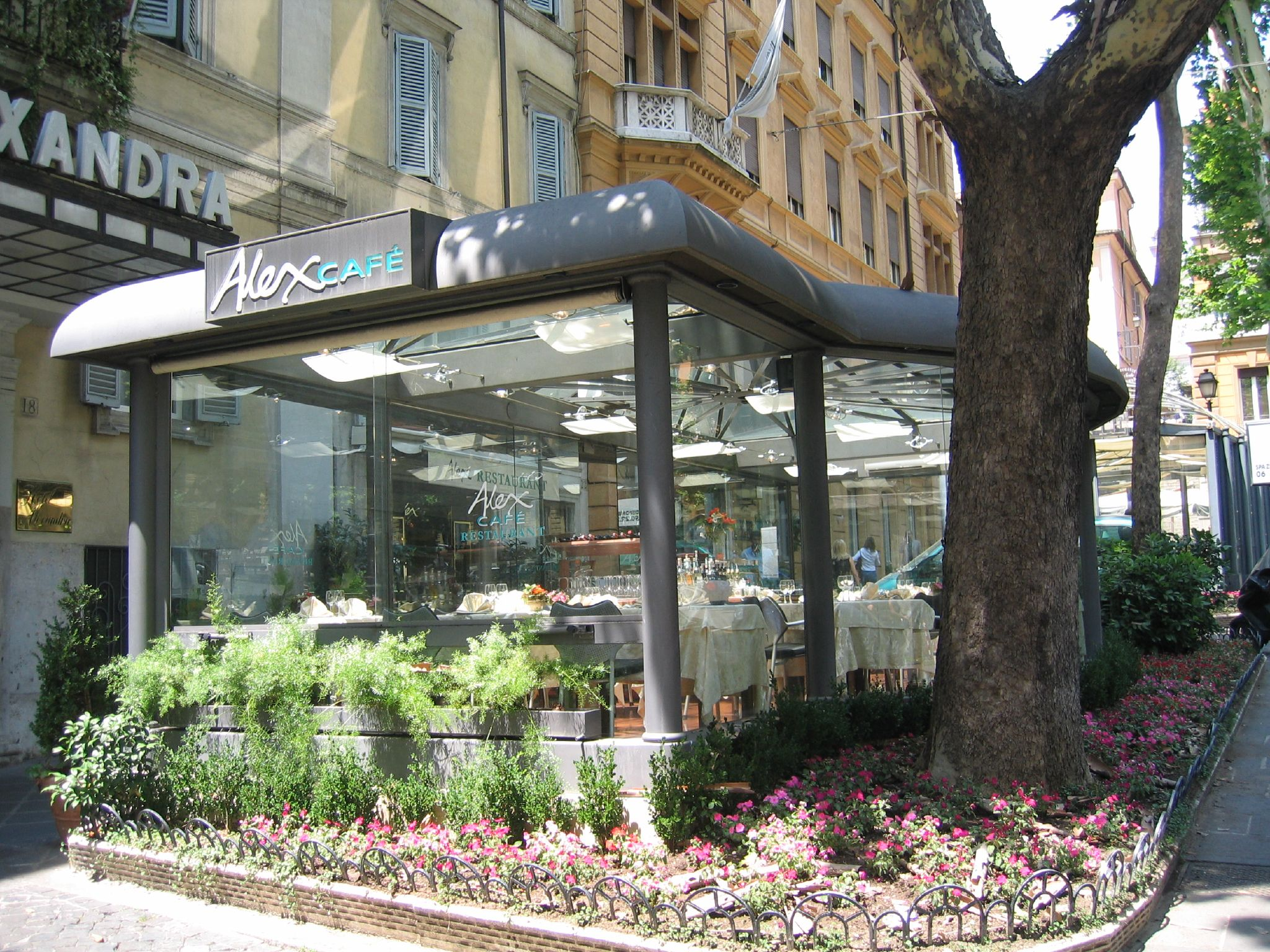 Via Veneto, Roma, Italiaimg_0959